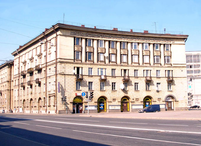 Площадь Калинина (Санкт-Петербург). В пятидесятые годы на пересечении Кондратьевского и Полюстровского проспектов Ленинграда формировался ансамбль площади М. И. Калинина. Дополняют ансамбль два 5-этажных дома, сооружённых в 1955 году (Полюстровский просп., 31 и 42) по проекту архитекторов Л. Н. Линдрота, А. К. Барутчева и Н. И. Иоффе.